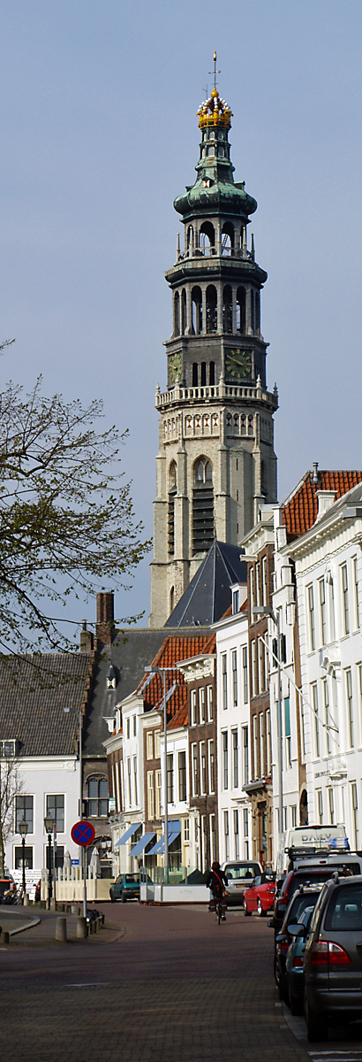 toren abdij complex de Lange Jan te Middelburg